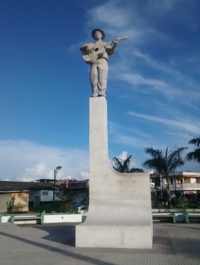 Parque Caballito Garces